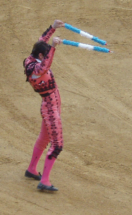 Juan José Padilla dispuesto a poner banderillas en la plaza de toros de Estepona, Málaga.